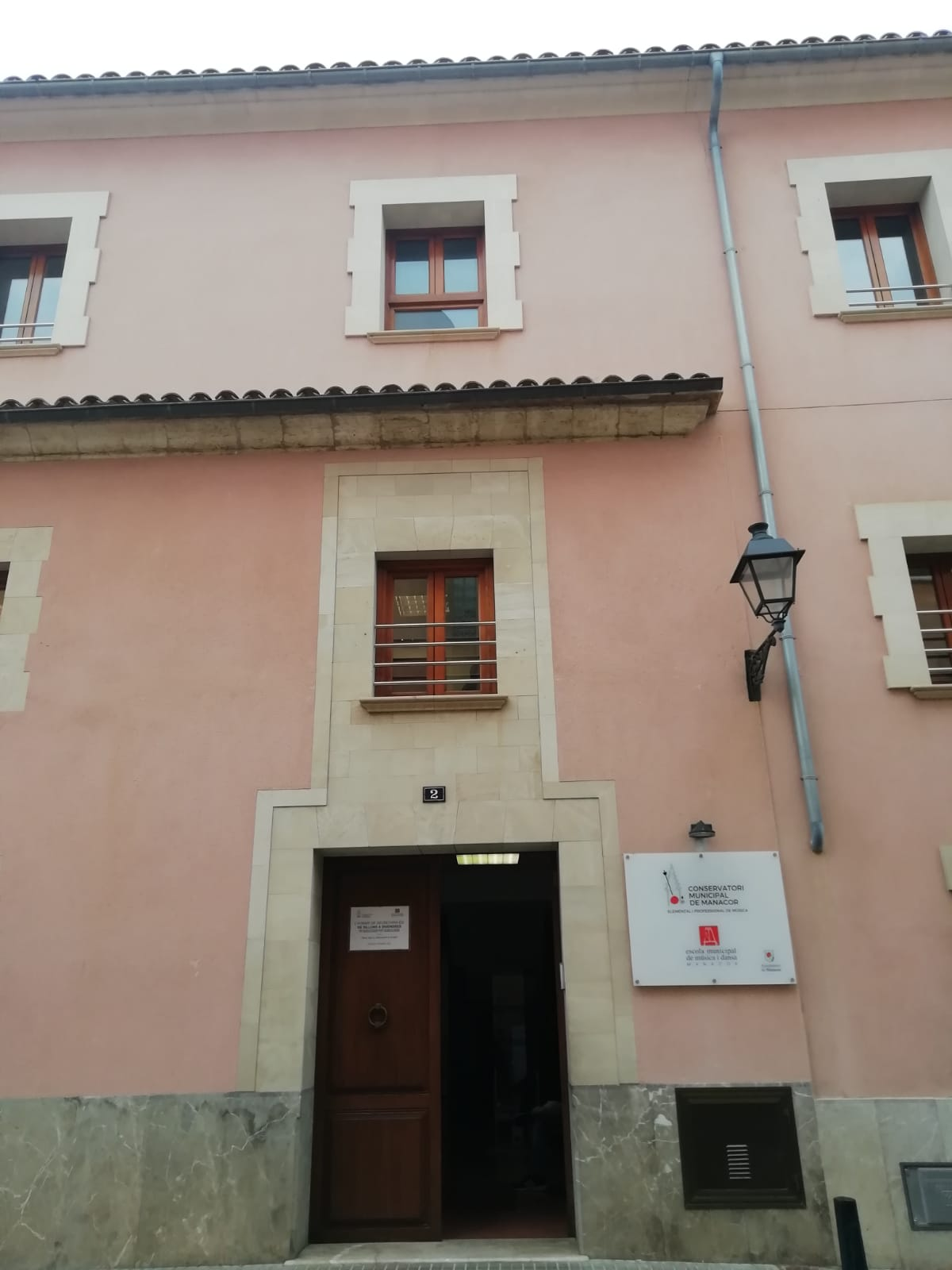 Façana del Conservatori de Manacor